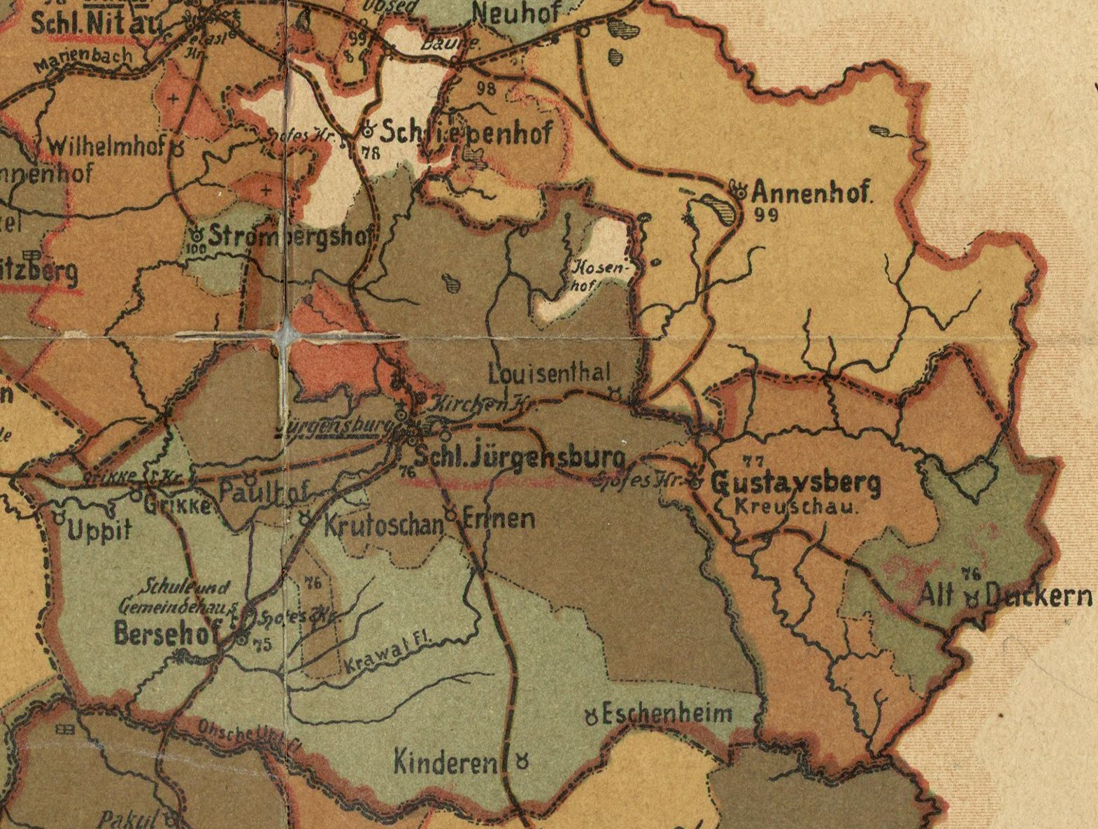 Jaunpilsi kihelkonna mõisad 1905. aastal